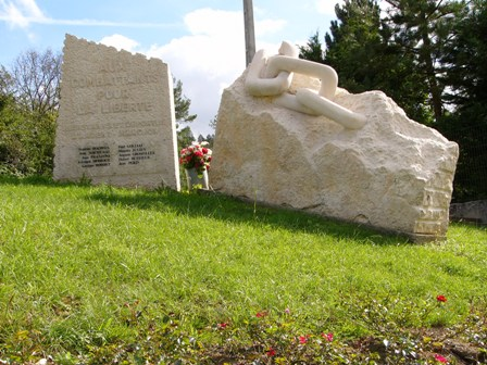 Monument de la Résistance.1939-1945